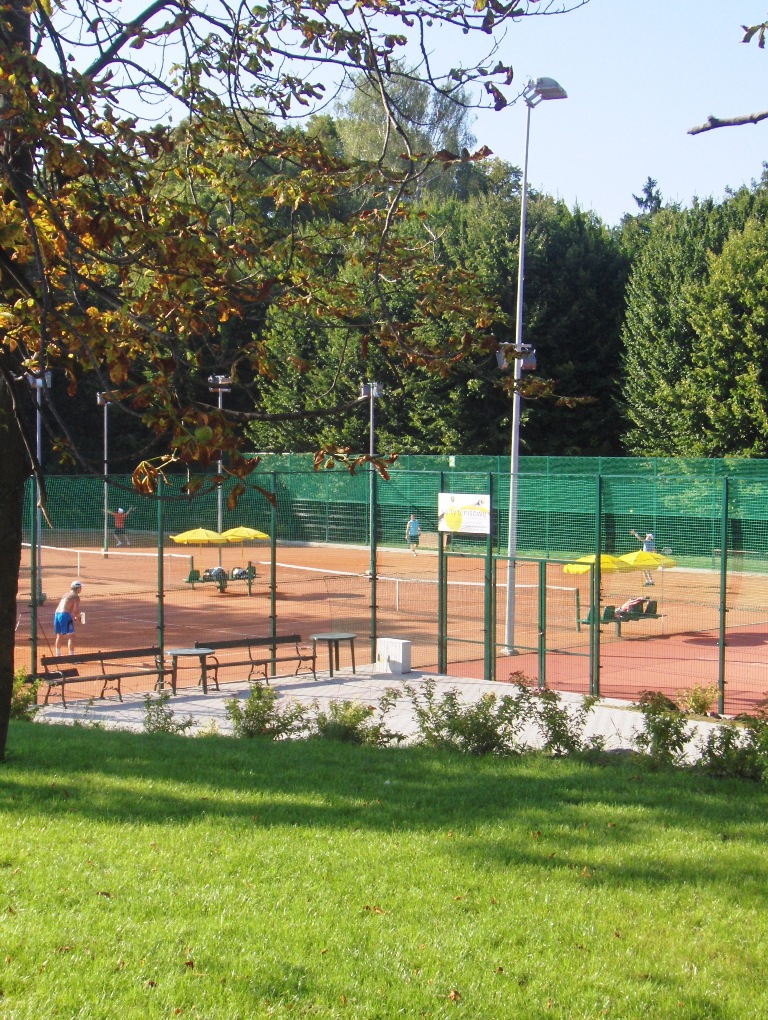 Korty tenisowe przy Parku A. Mickiewicza w Wieliczce